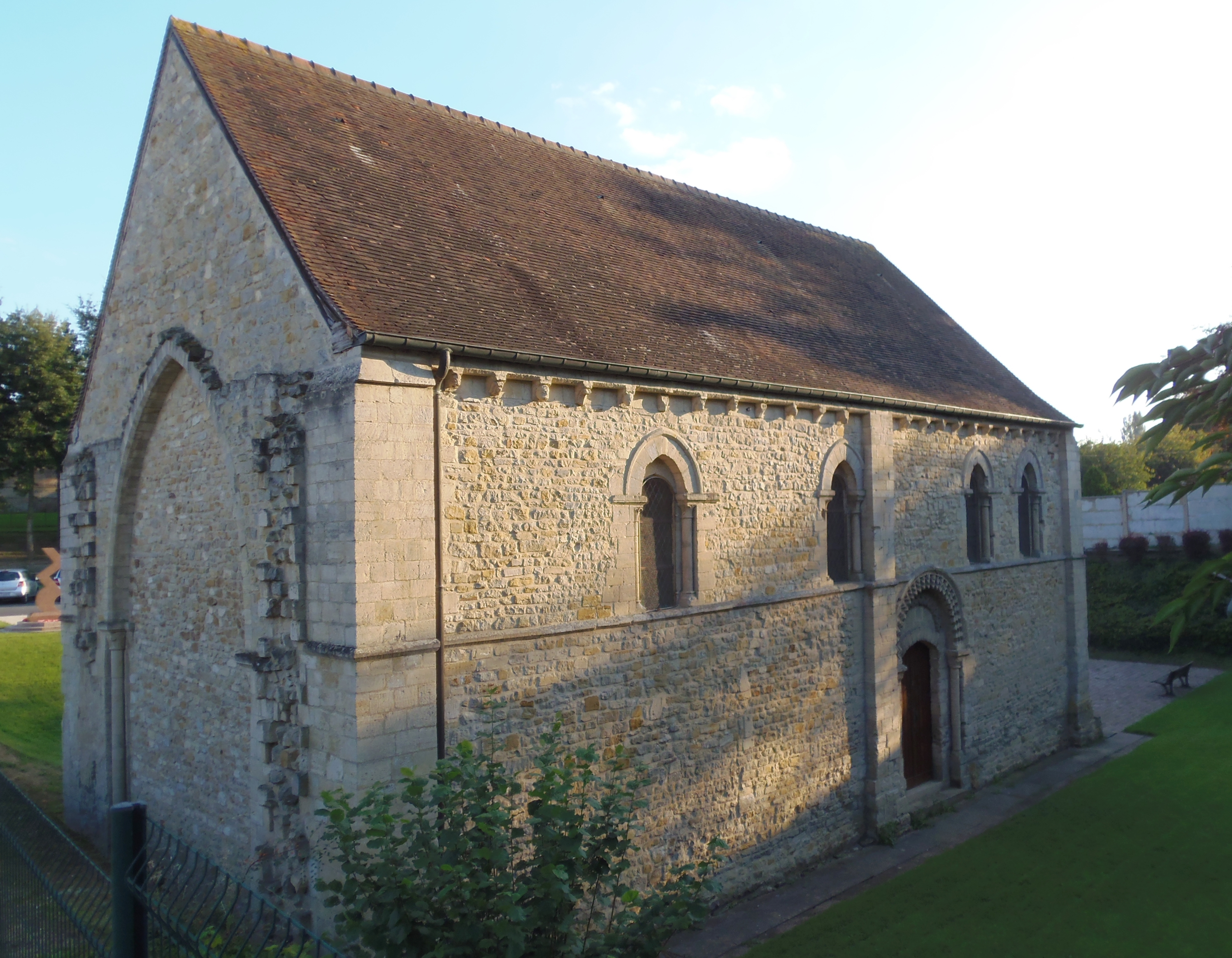 Tilly-sur-Seulles (Normandie, France). La chapelle Notre-Dame-du-Val, musée de la bataille de la commune.